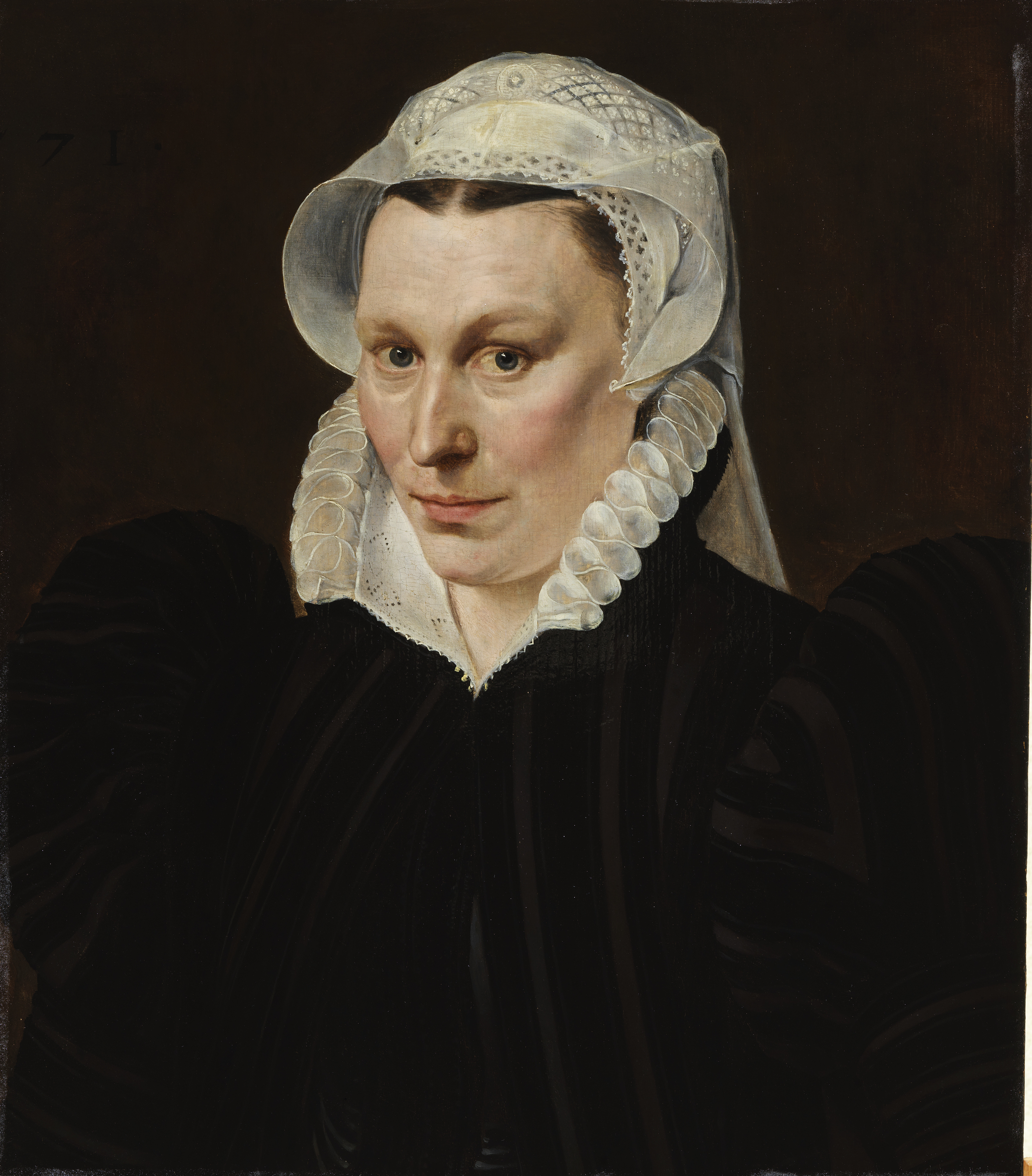 schilderij ( Adriaen Thomasz. Key ( Museum Plantin-Moretus